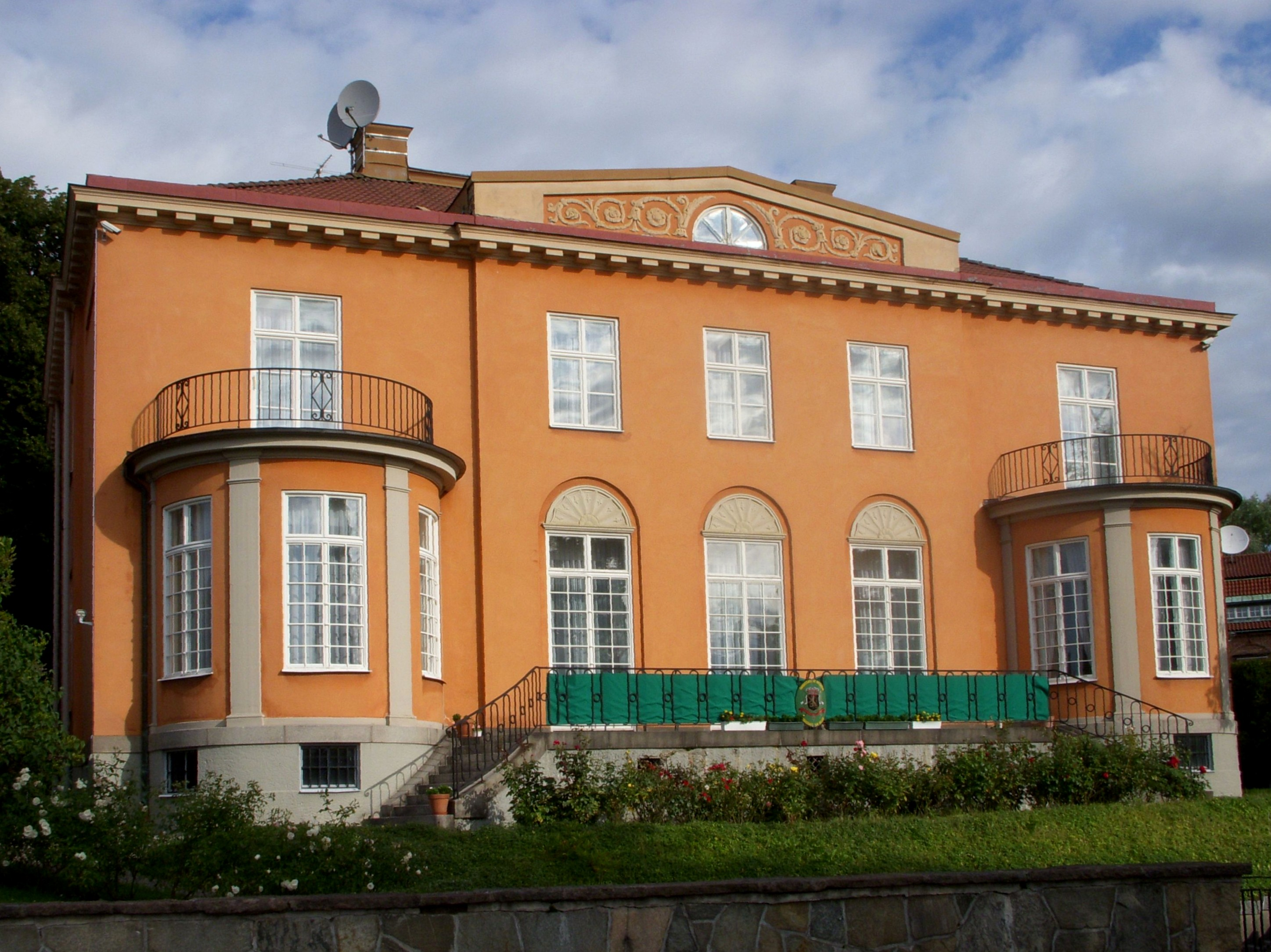 Villa Josephson i Diplomatstaden i Stockholm